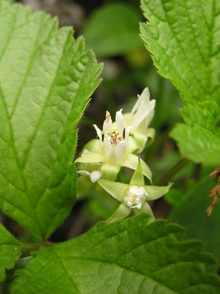 Rubus saxatilis, aufgenommen am Krippenstein (Dachsteinmassif, Österreich).